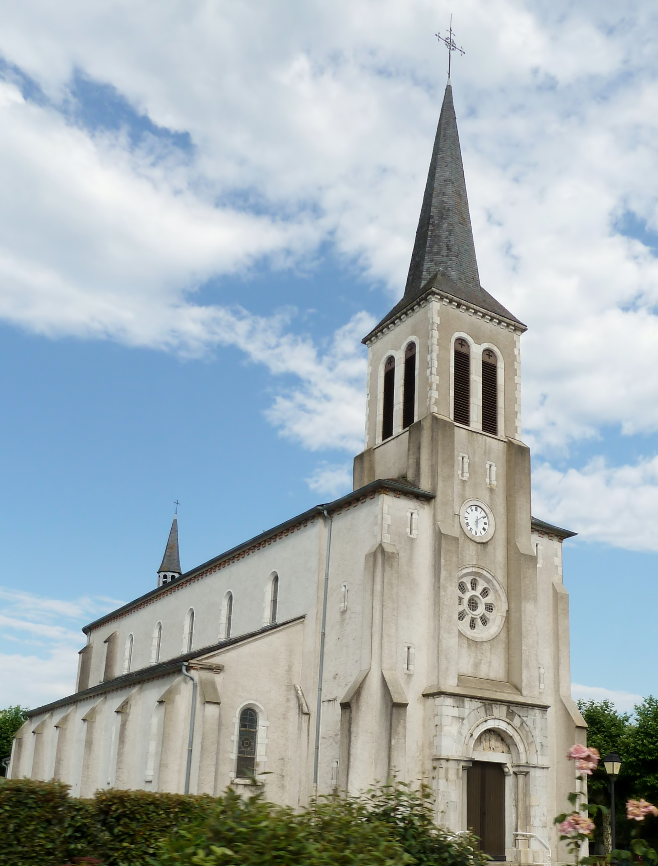 Église de Beuste